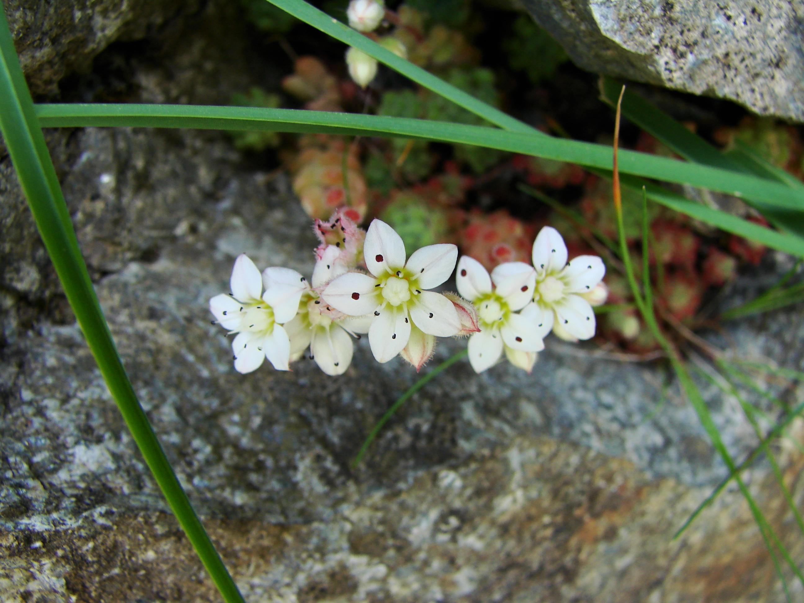 Vallée du Marcadau, Pyrénées françaises, commune de Cauterets, département des Hautes-Pyrénées (France) : Sedum hirsutum